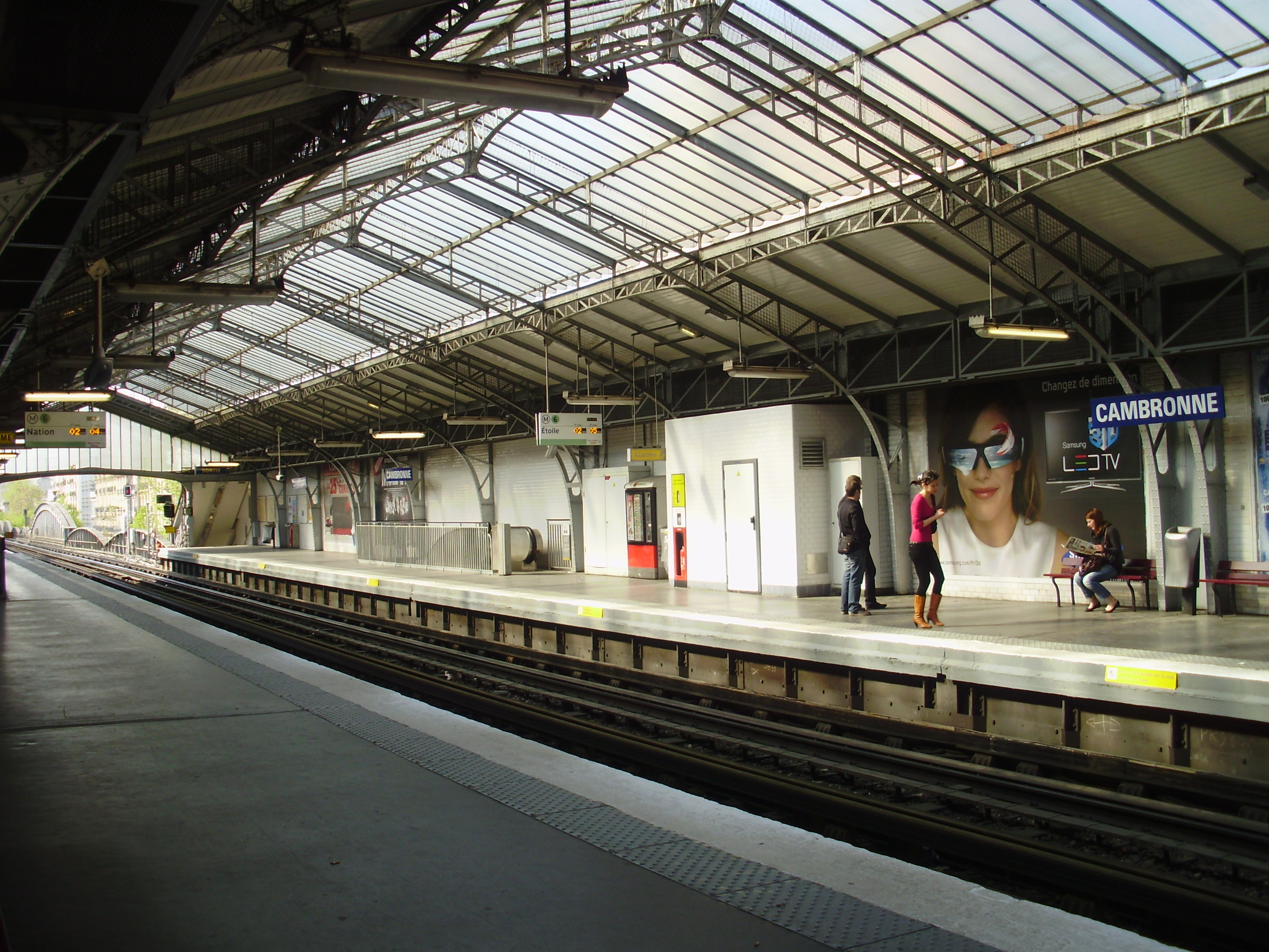 Quais de la station Cambronne du métro de Paris